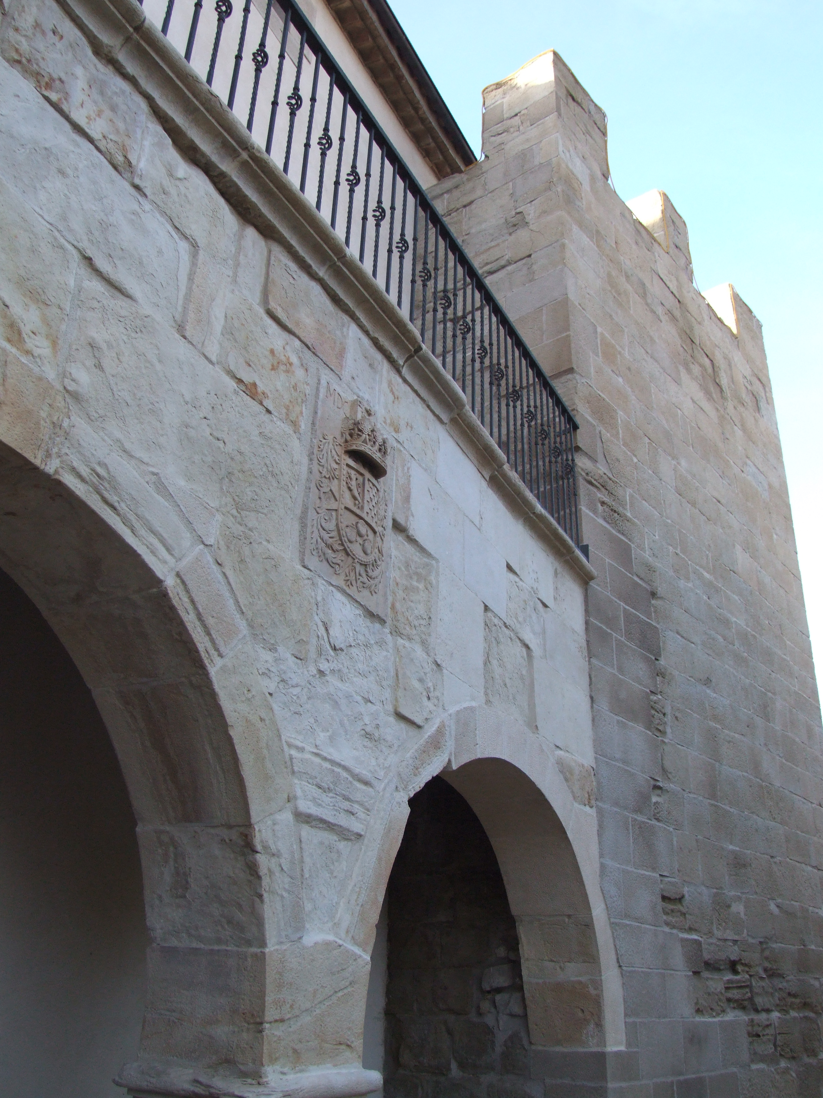 El castell o comanda de Barbens és un casal residencial fortificat de l'orde del Temple, l'origen del qual es remunta al segle XII. El primer esment documental és de l'any 1168, quan n'era comanador Ramon Barrufell. Als inicis del segle XIV, com tota la resta de comandes templeres, va passar a mans de l'orde de l'Hospital de Sant Joan de Jerusalem o de Malta, que va senyorejar Barbens fins al segle XIX. La major part de la construcció correspon al segle XVI (torre quadrangular emmerletada de la cantonada) i sobretot al XVIII.